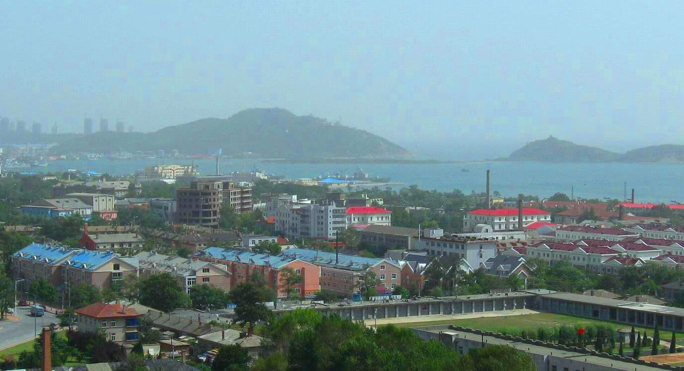 Вид на современный Порт-Артур (Люйшунь) и рейд.